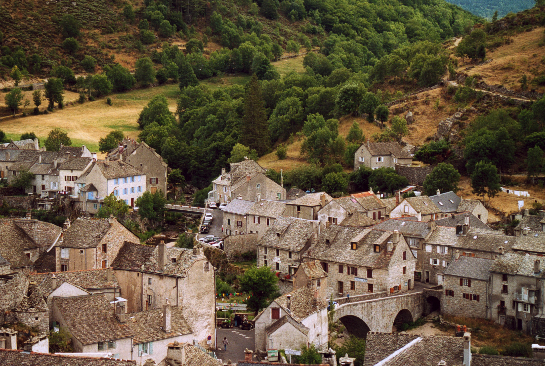 France Lozère Le Pont-de-Montvert Photographie prise par GIRAUD Patrick Août 2005